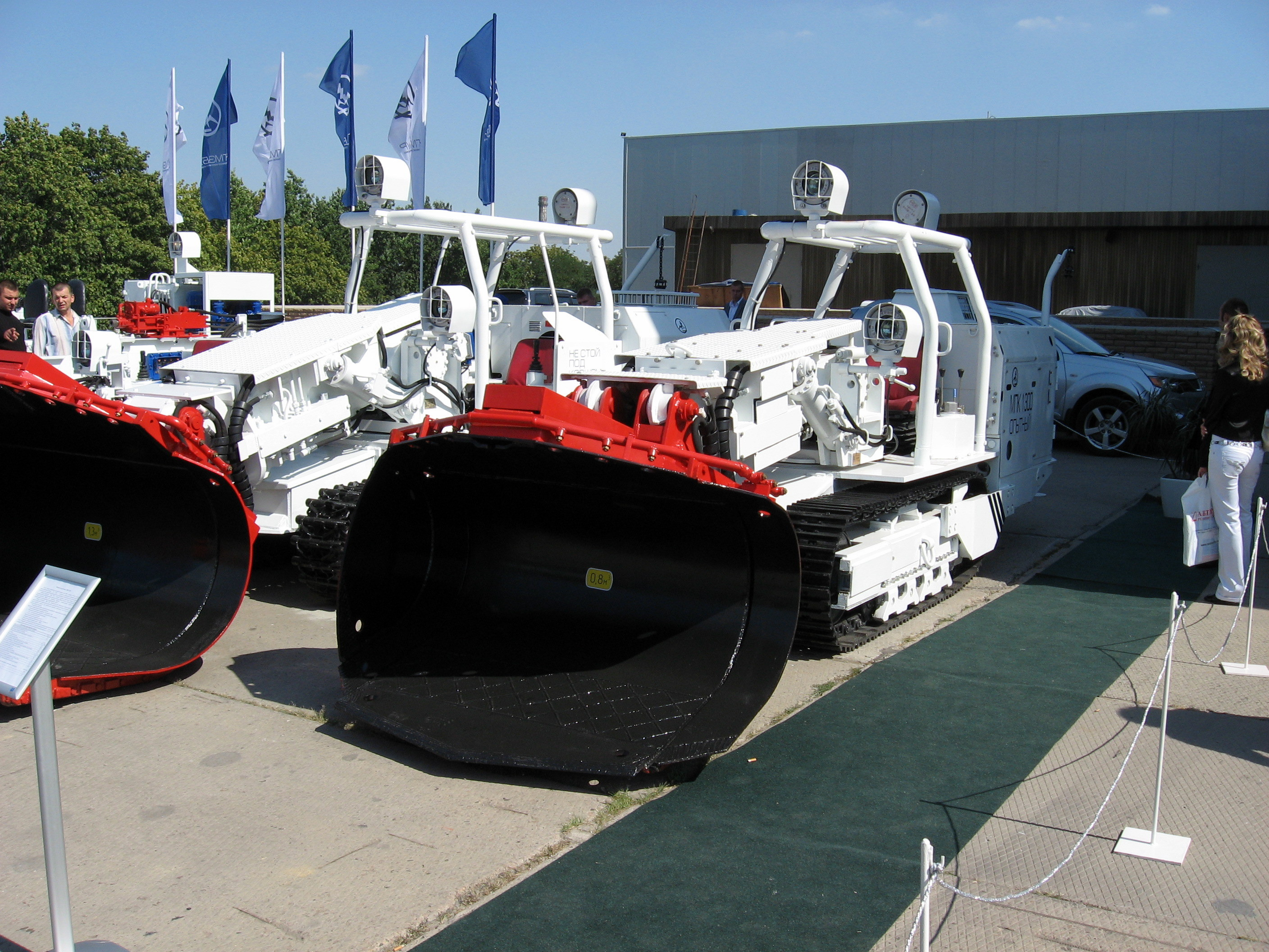 Фото з виставки Вугілля-Майнінг 2008